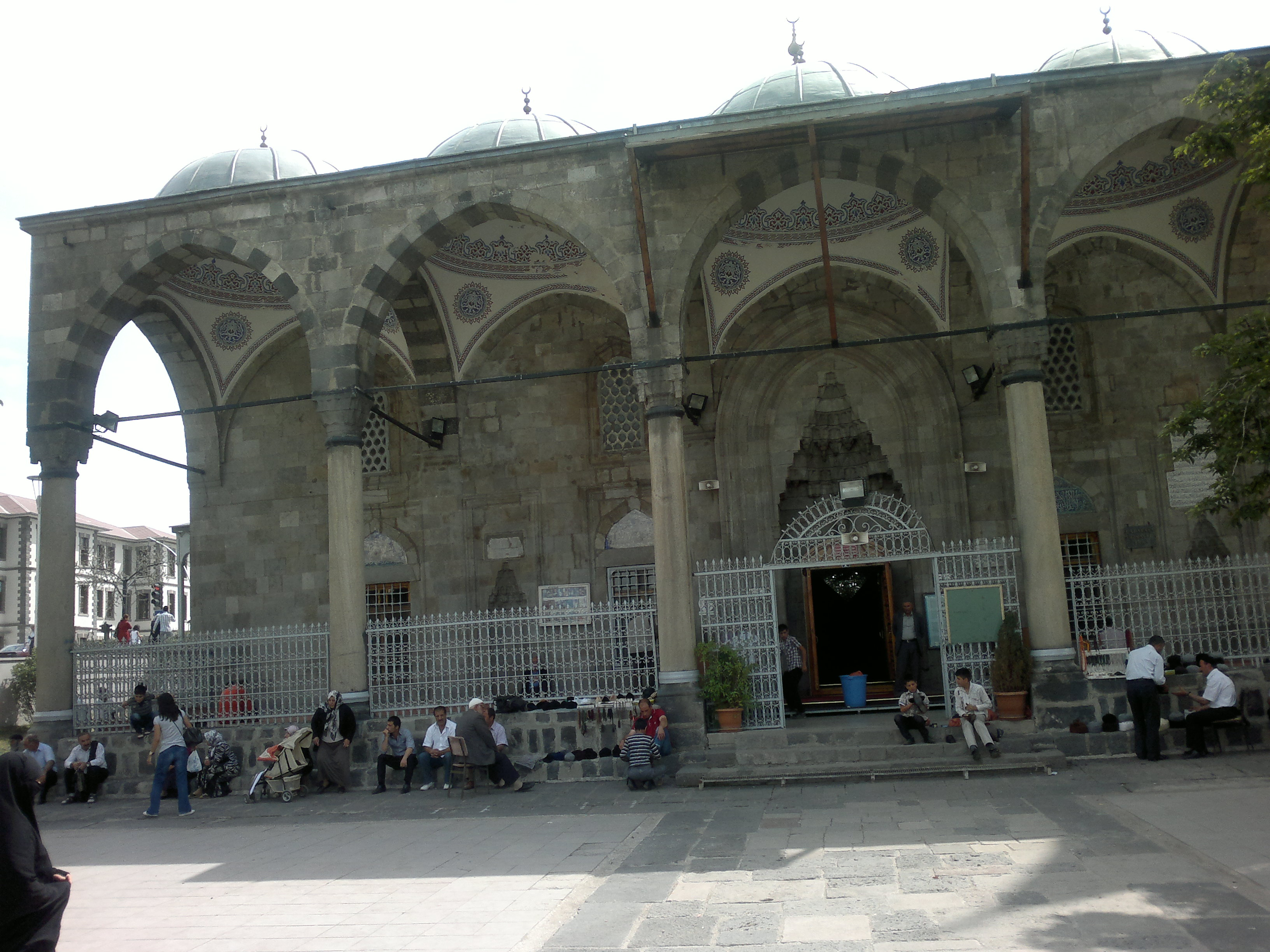 Erzurum Lala Mustafa Paşa Camii, Türkiye'de Erzurum İli merkez ilçesi Yakutiye'de 1562 yılında Lala Mustafa Paşa tarafından yaptırılmış Erzurum ’daki ilk Osmanlı camisidir.